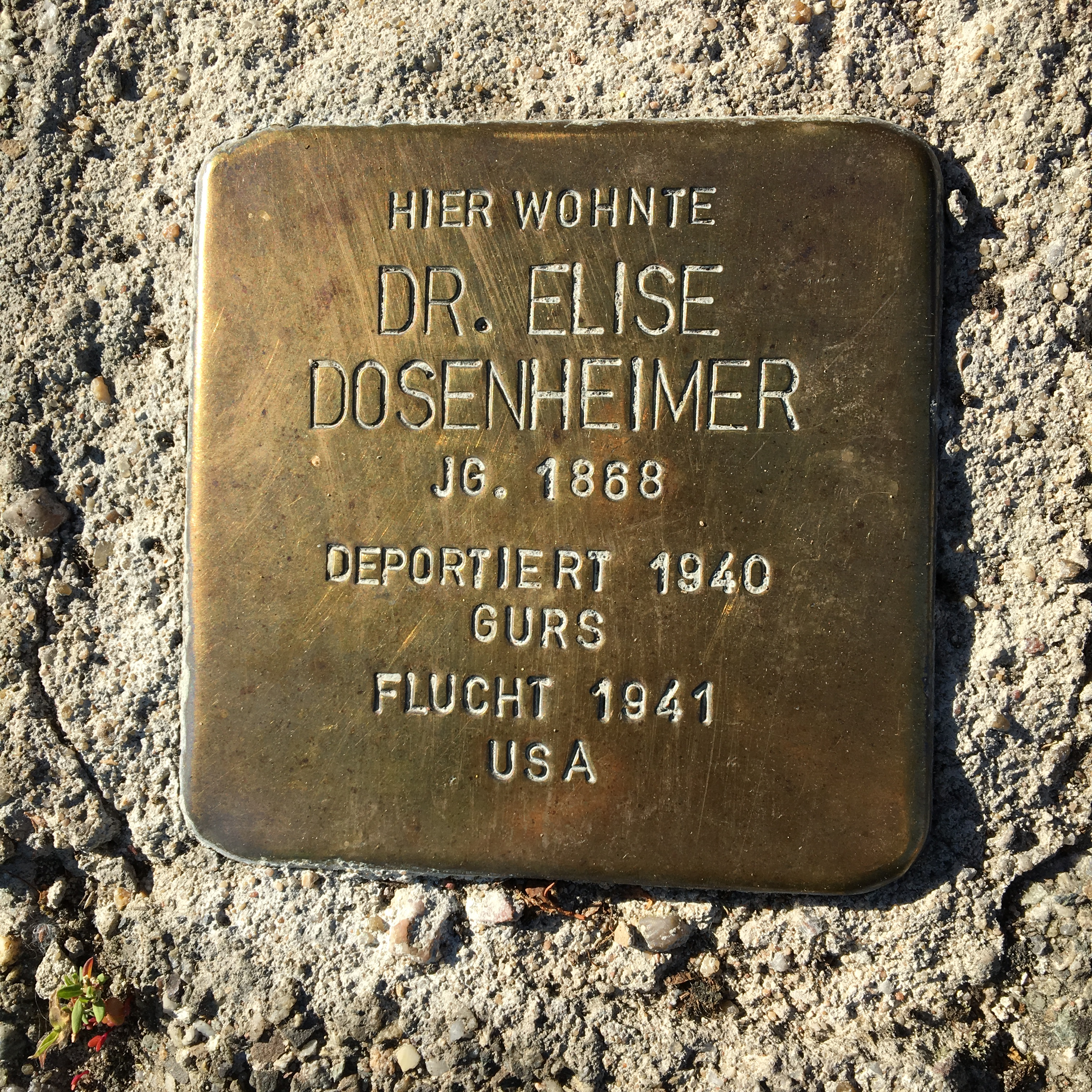 Photo d'un stolpersteine à Heidelberg, 36 Blumenthalstrasse